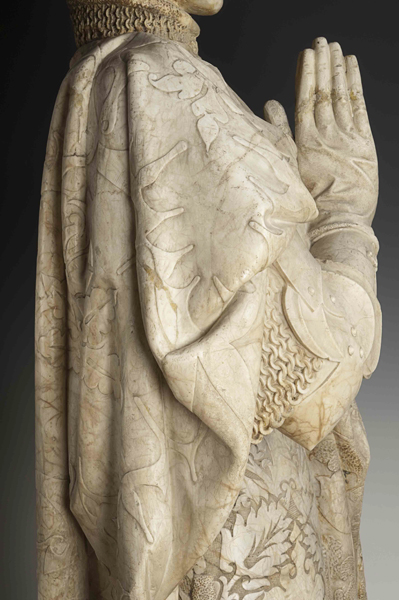 Estatua orante de Pedro I de Castilla (Baja Edad Media). Número de inventario: 50234.